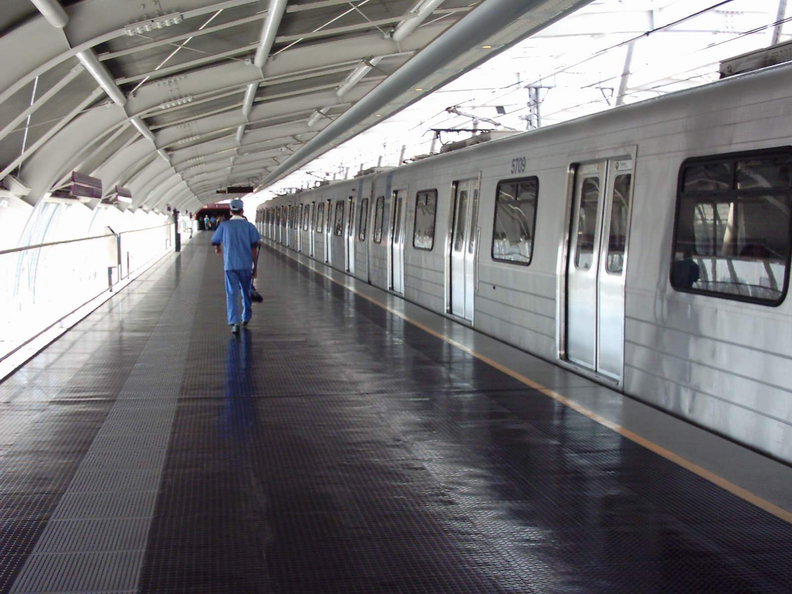 Visão interna da estação Sto Amaro do metrô - linha 5 Lilás